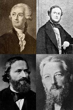 Analytical chemists photo collage (in clockwise from the top Lavoisier, Gustav Kirchhoff, Wilhem Ostwald and Gustav Kirchhoff) Antoine Laurent de Lavoisier (* 26. August 1743 in Paris; † 8. Mai 1794 ebenda) Gustav Robert Kirchhoff (* 12. März 1824 in Königsberg (Preußen); † 17. Oktober 1887 in Berlin) Wilhelm Ostwald (* 21. Augustjul./ 2. Septembergreg. 1853 in Riga; † 4. April 1932 in Leipzig) Gustav Robert Kirchhoff (* 12. März 1824 in Königsberg (Preußen); † 17. Oktober 1887 in Berlin)